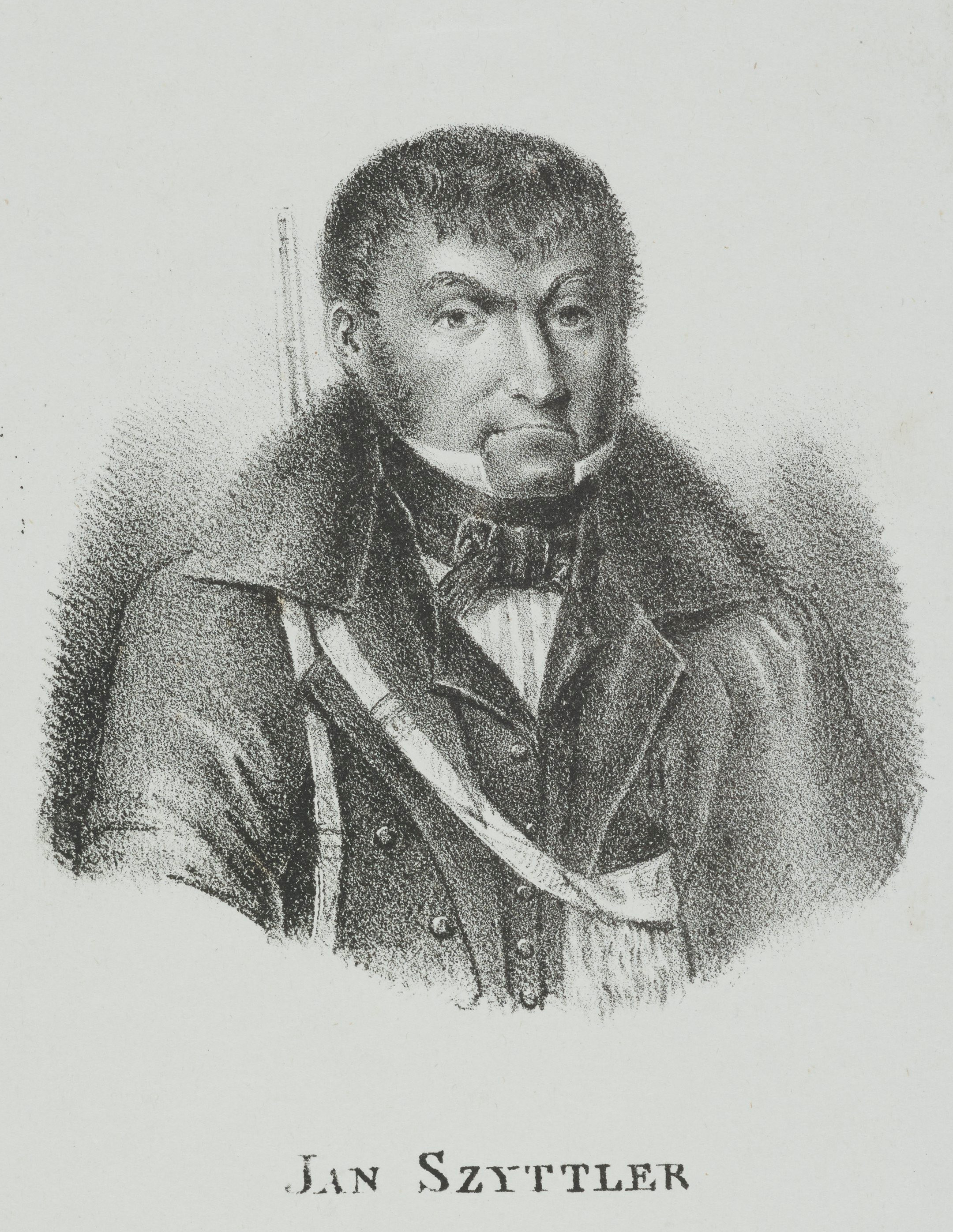 Jan Szyttler